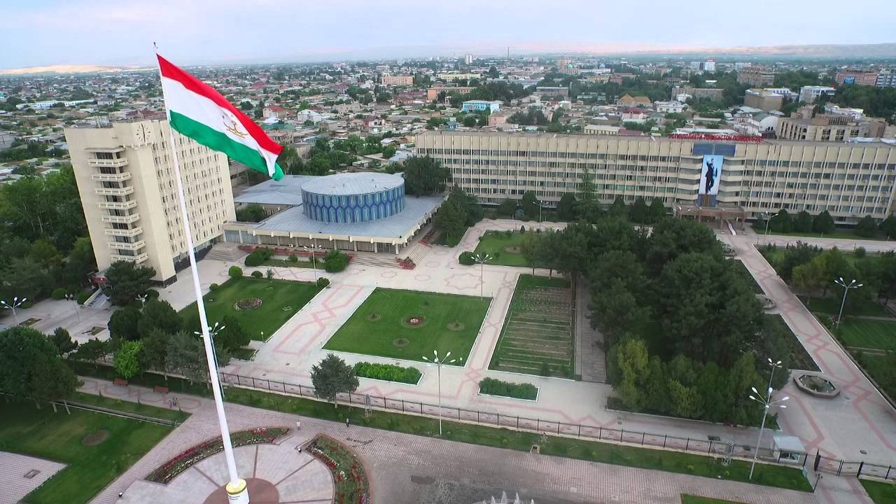 Тоҷикӣ: Майдони марказии шаҳрӣ бо парчами Тоҷикистон. ш. Хуҷанд